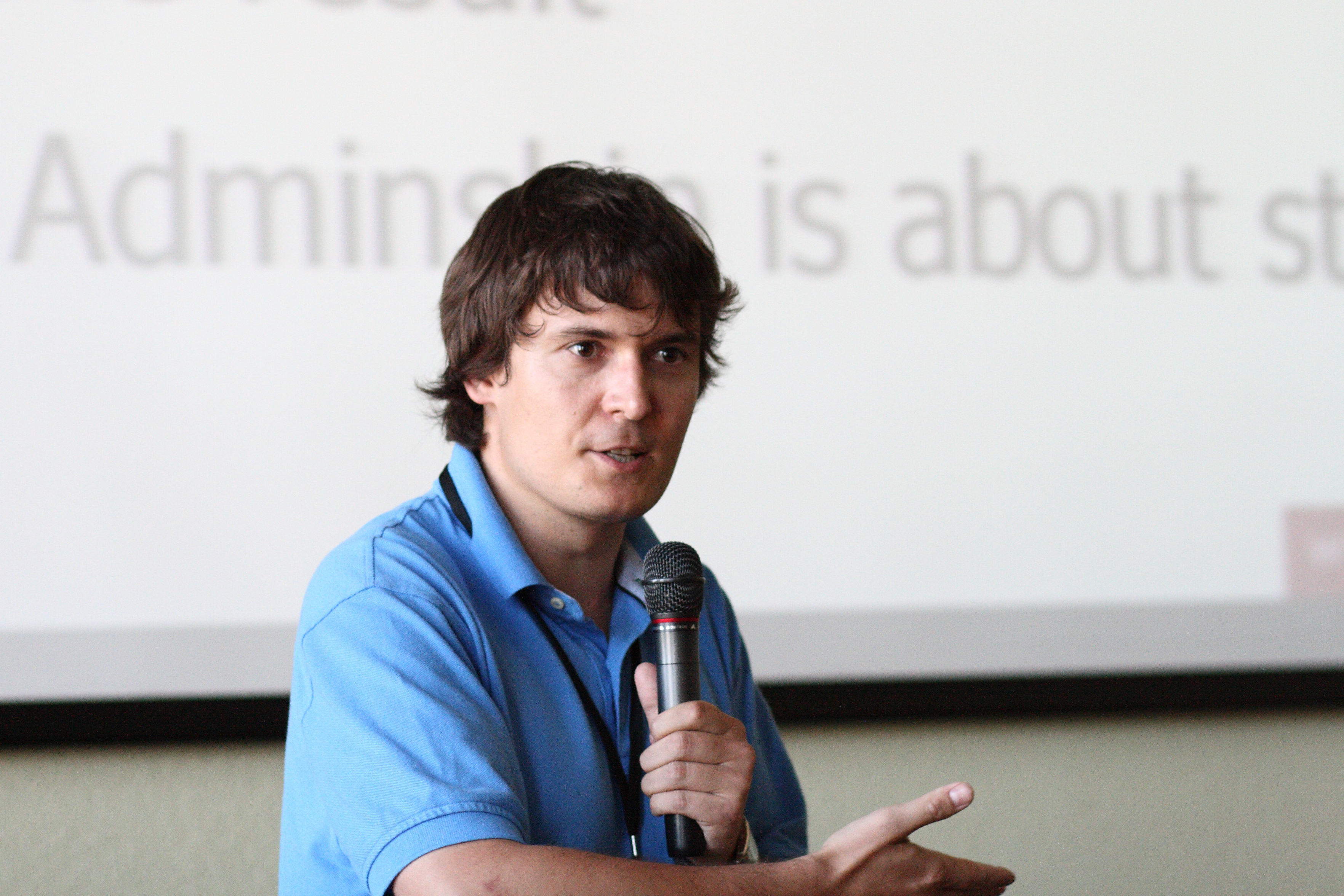 Dariusz Jemielniak (Pundit), a Wikimania 2010 presenter